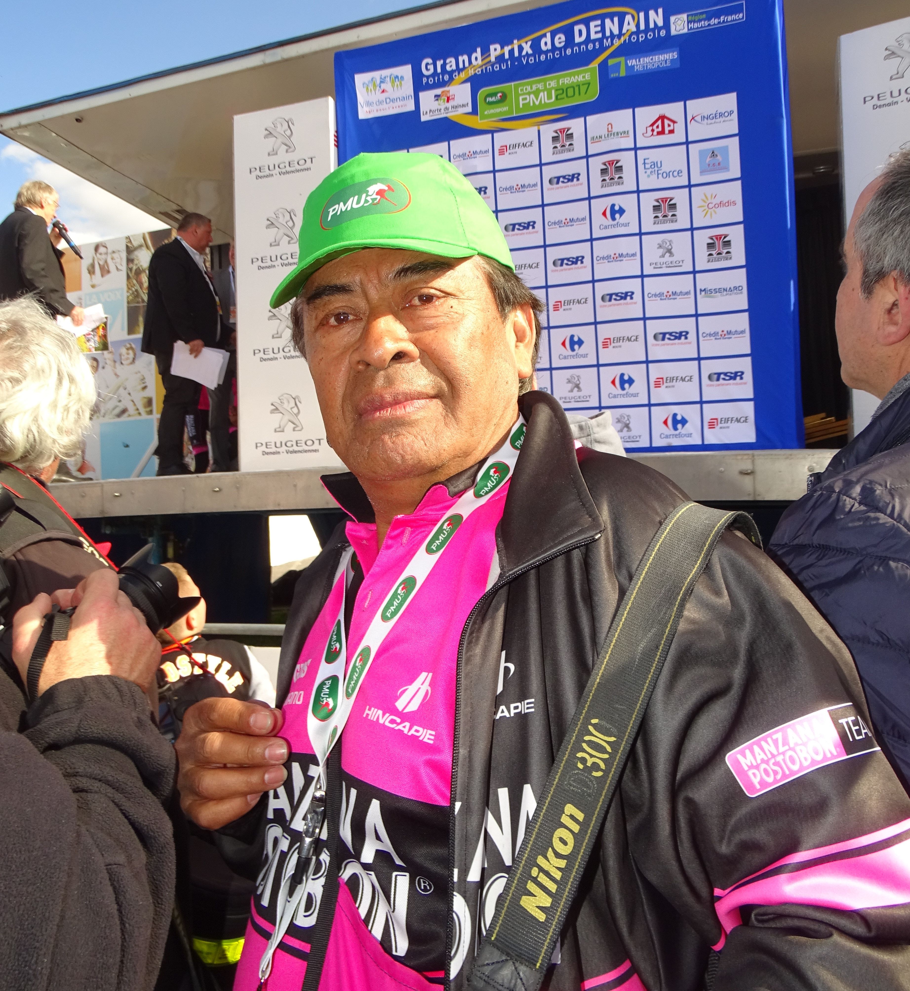 Reportage réalisé le jeudi 13 avril à l'occasion du départ et de l'arrivée du Grand Prix de Denain 2017 à Denain, Nord, Nord-Pas-de-Calais-Picardie, France.